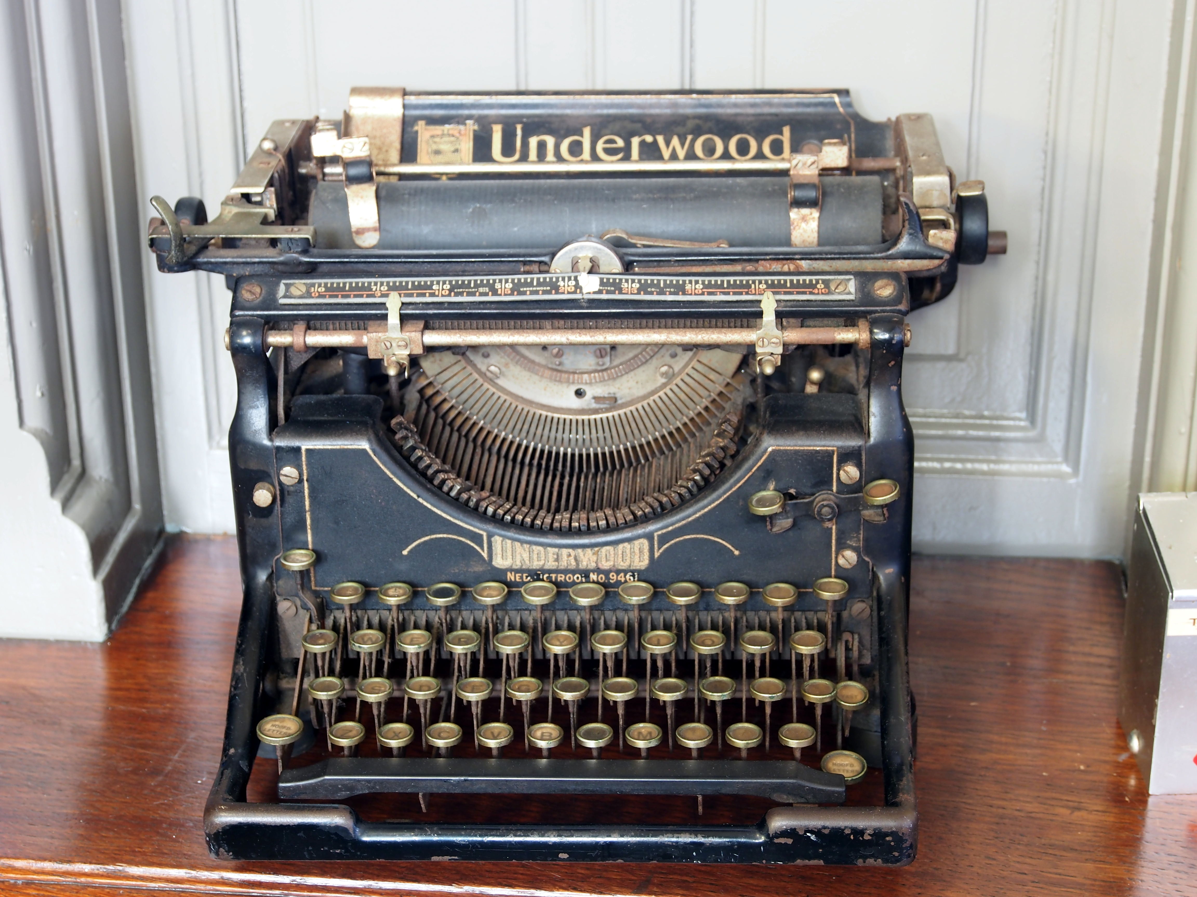 Photographed at Station Lisse.